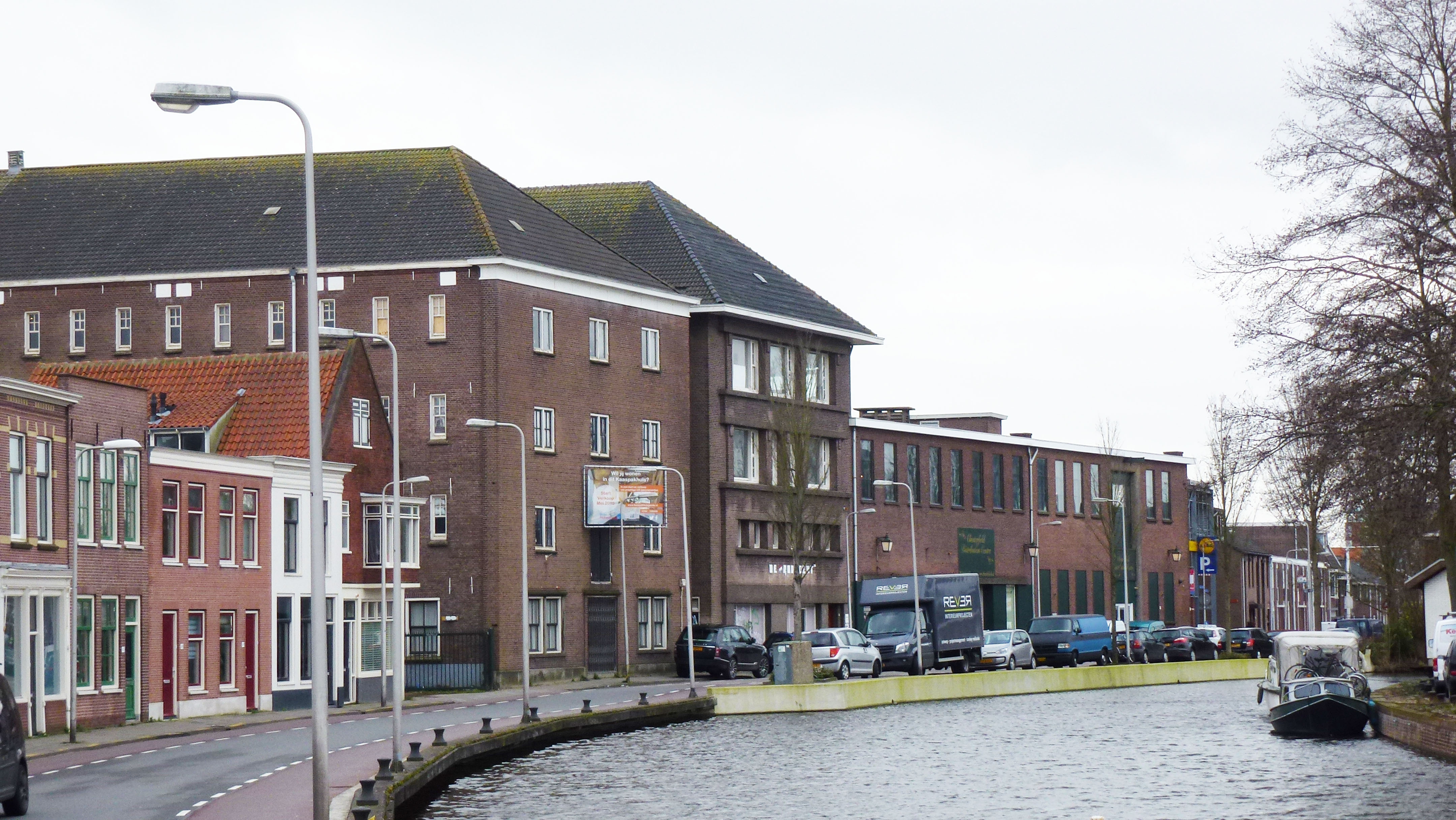 Kaaspakhuis en kantoor De Producent in Gouda